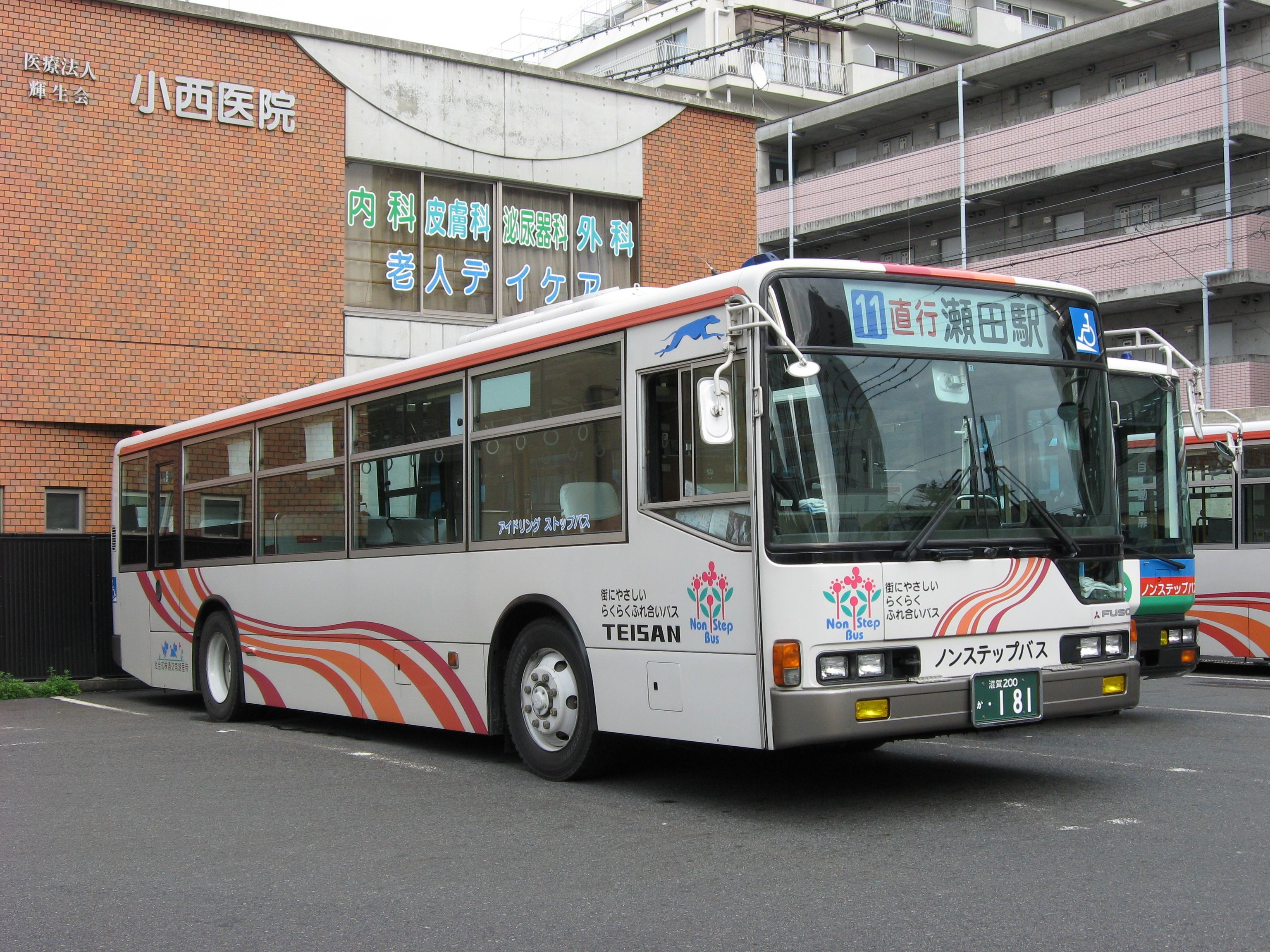 Teisan Konan Kotsu 0181